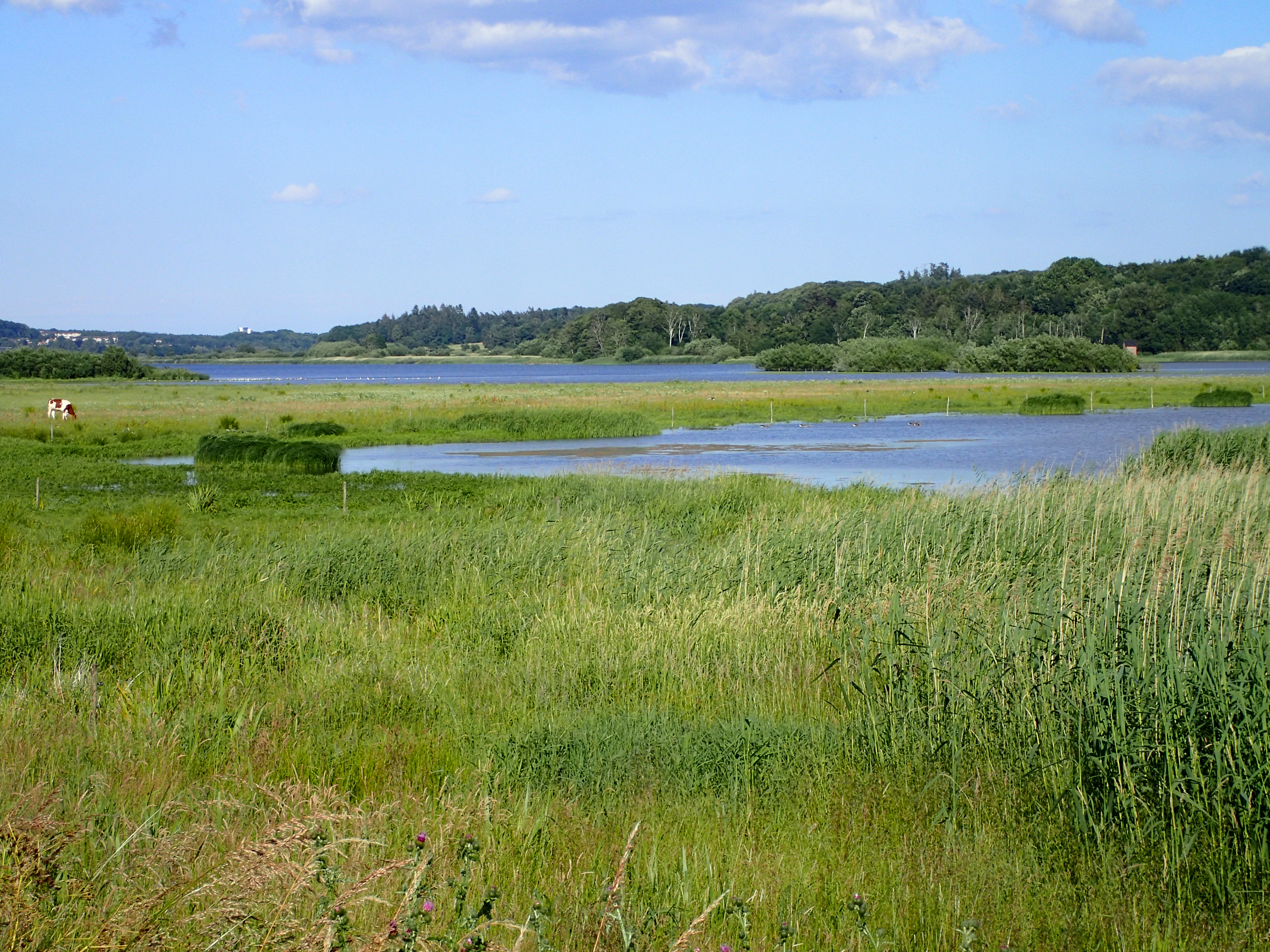 Årslev Engsø. Kik over de våde enge fra den nordvestlige bred.